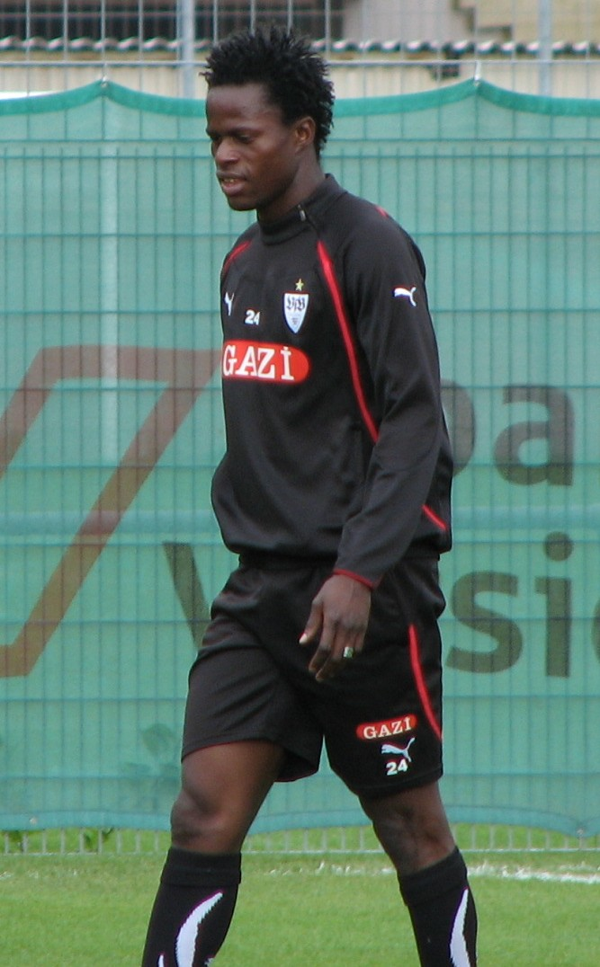 Mamadou Bah beim VfB-Training. Aufgenommen von